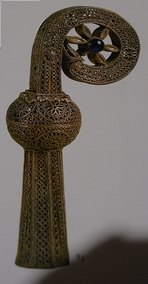 Krümme vom Bischofsstab des Robert de Molesme, Dijon, Musee des Beaux Arts, Inv. Nr. CA 1455. Italien um 1100 Silberfiligran, vergoldet, rote und violette Glasflüsse. Ursprünglich aus der Abtei Citeaux.